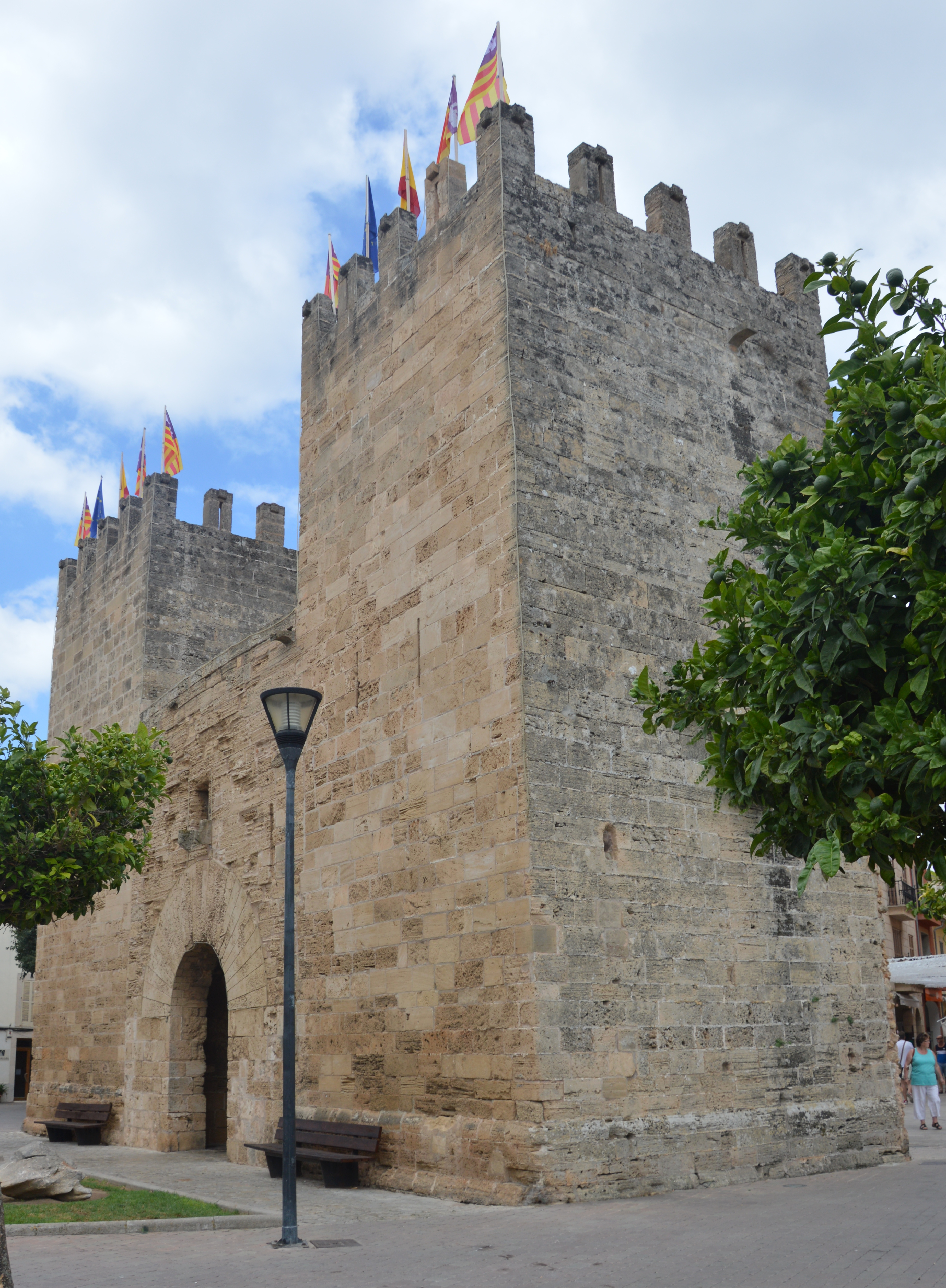 Porta del Moll in Alcudia